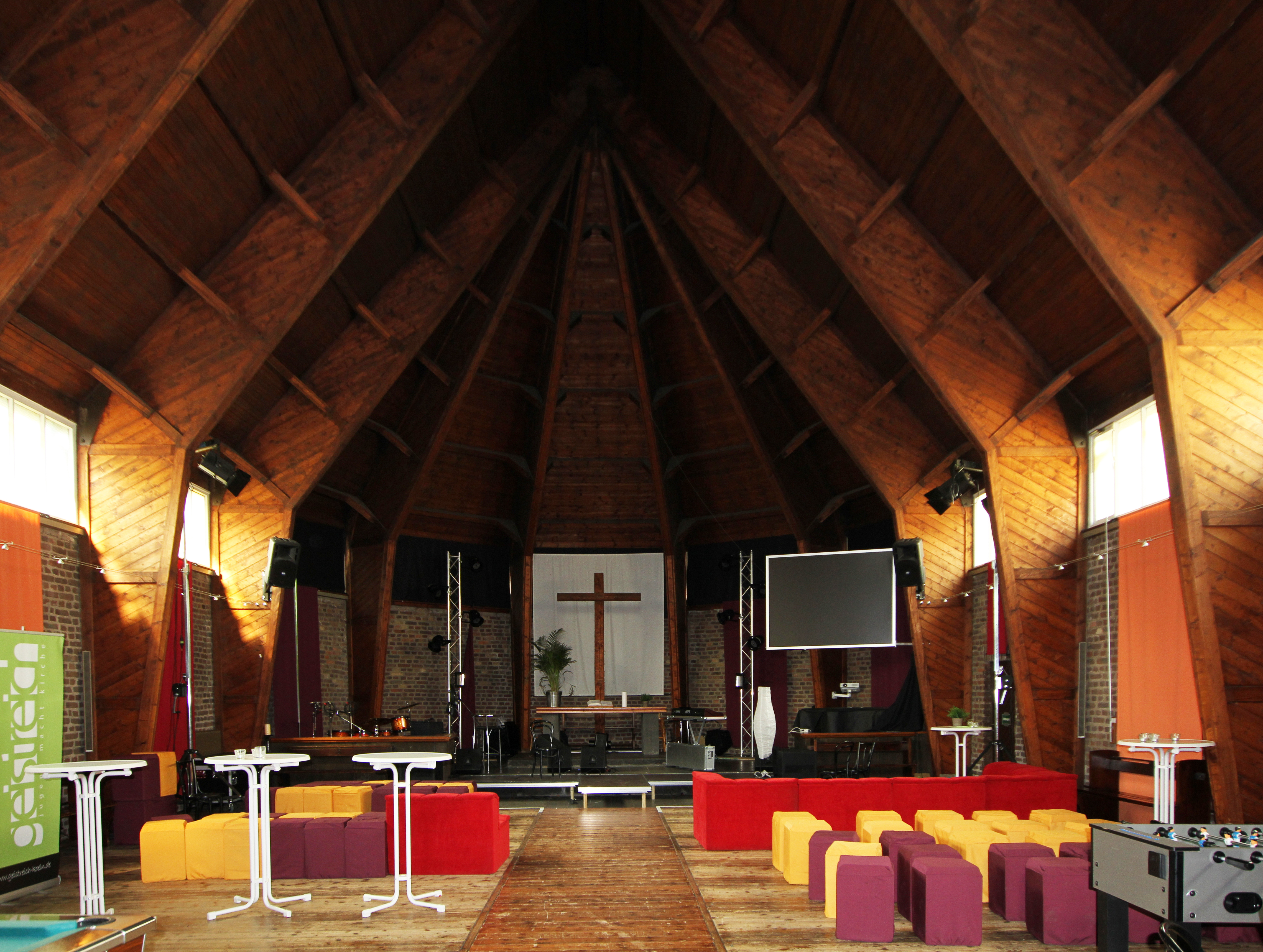 Köln-Mülheim, Adamsstraße 47 – 53. Innenansicht der Luther-Notkirche